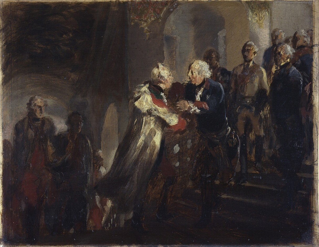 Zusammenkunft Friedrichs II. mit Kaiser Joseph II. von Österreich